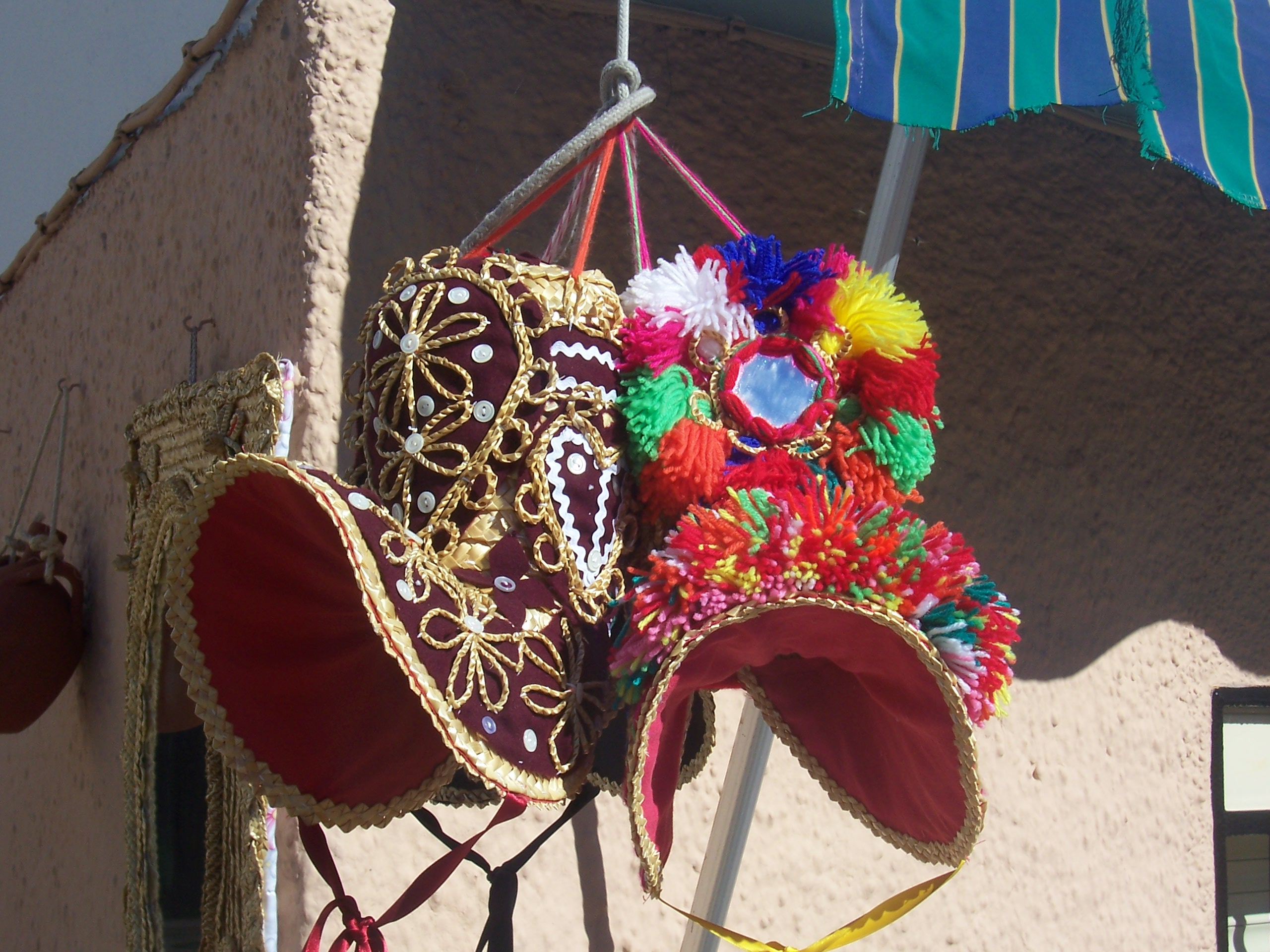 Gorras de Montehermoso de soltera (derecha) y casada (izquierda). Exposición de artesanía montehermoseña en la carretera EX-370